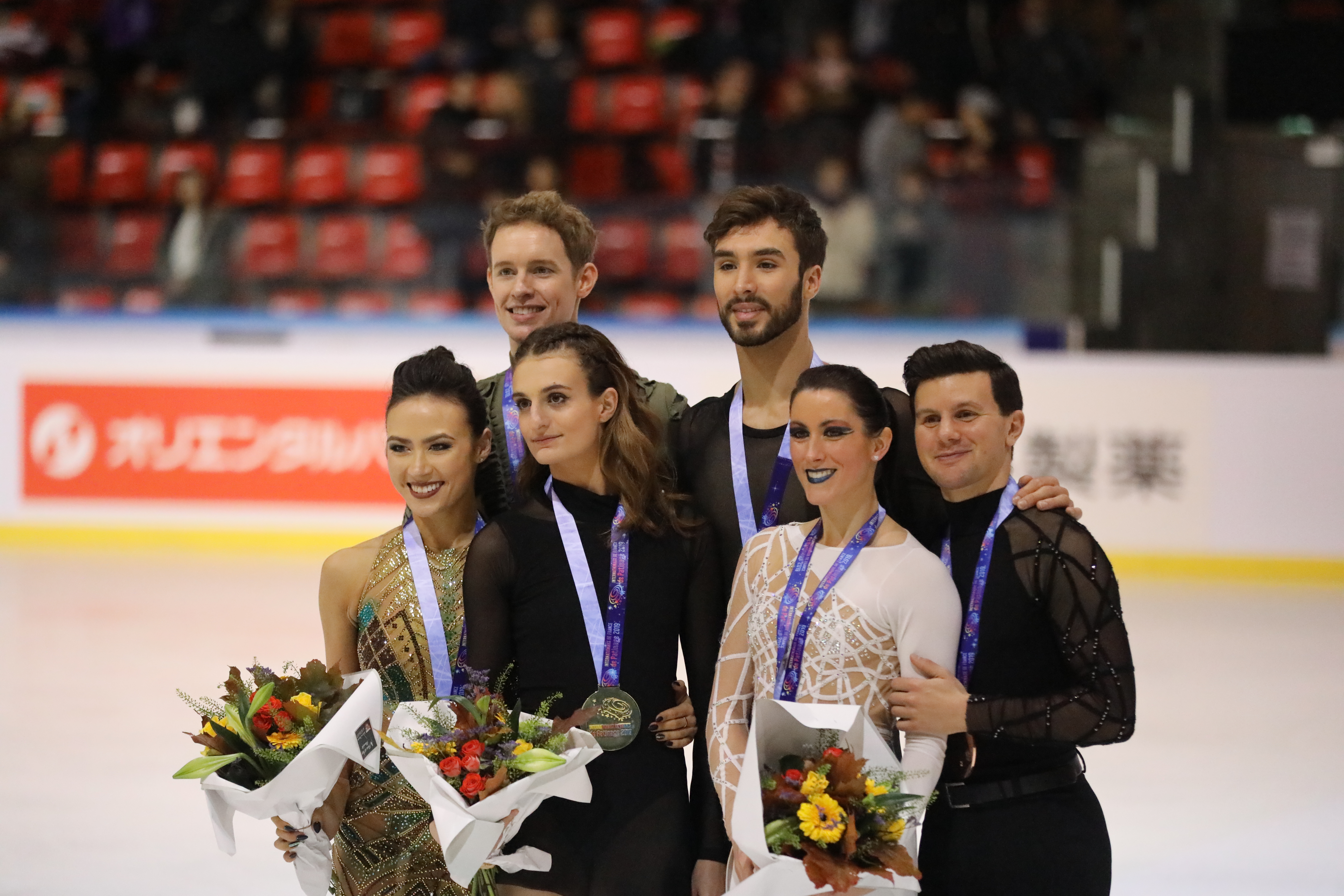 Médaillés en danse sur glace aux Internationaux de France 2019.